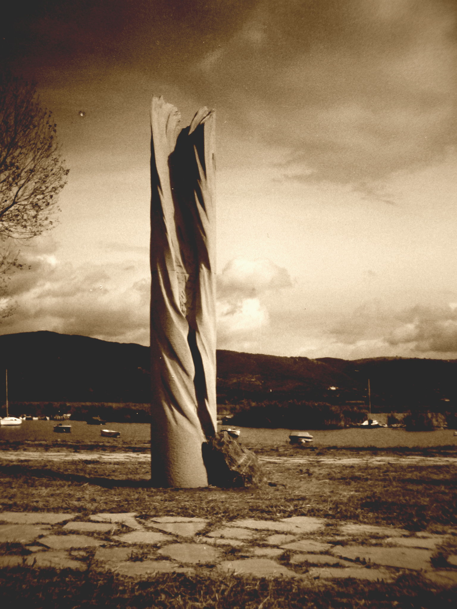 Skulptur von Volker Friedrich Marten am Lago Trasimeno in Umbrien. "Colonna colta" 1987, Sandstein, Höhe 4,50 m